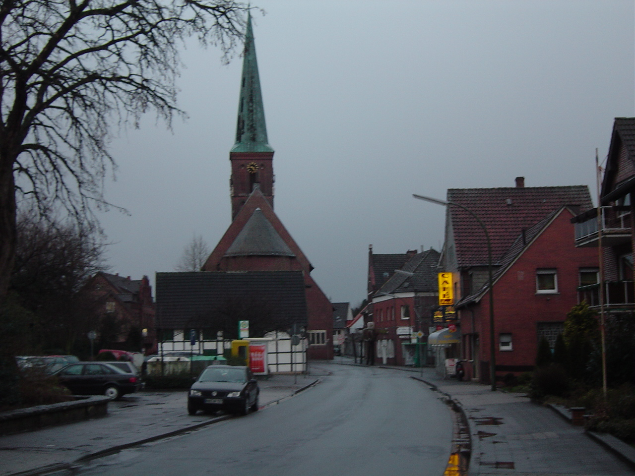 Pankratiuskirche in Hövel, Blick auf die Apsis